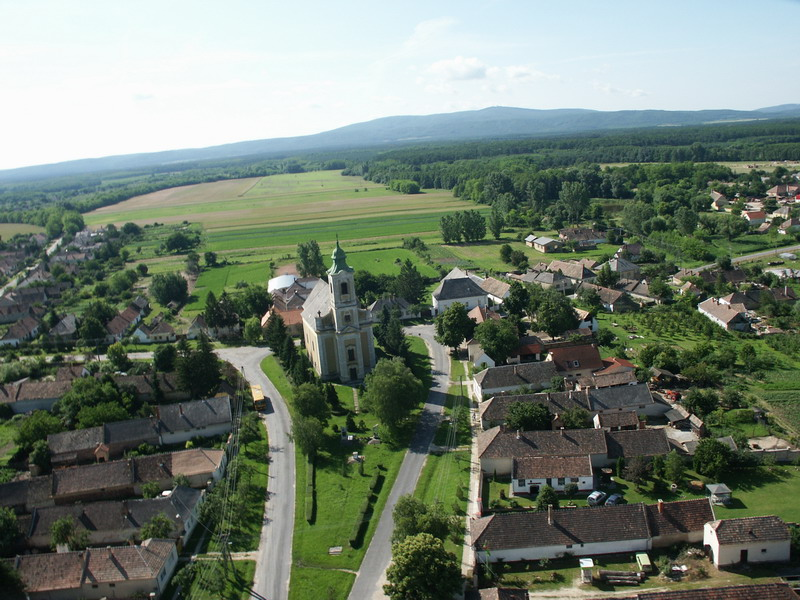 Pápateszér (légi fotó)